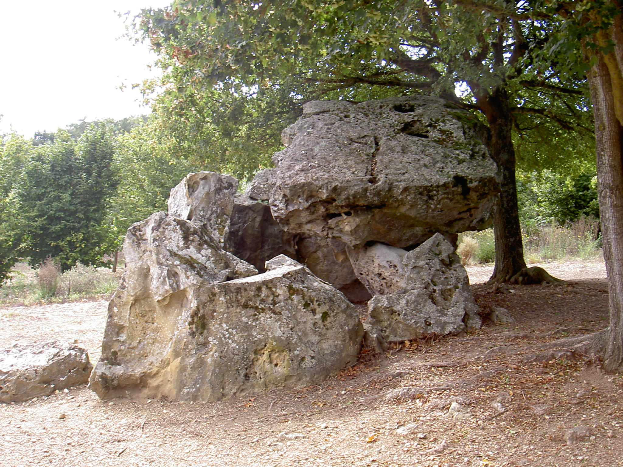 PA00097909